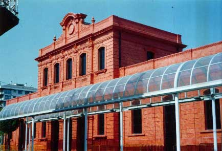 estacio00